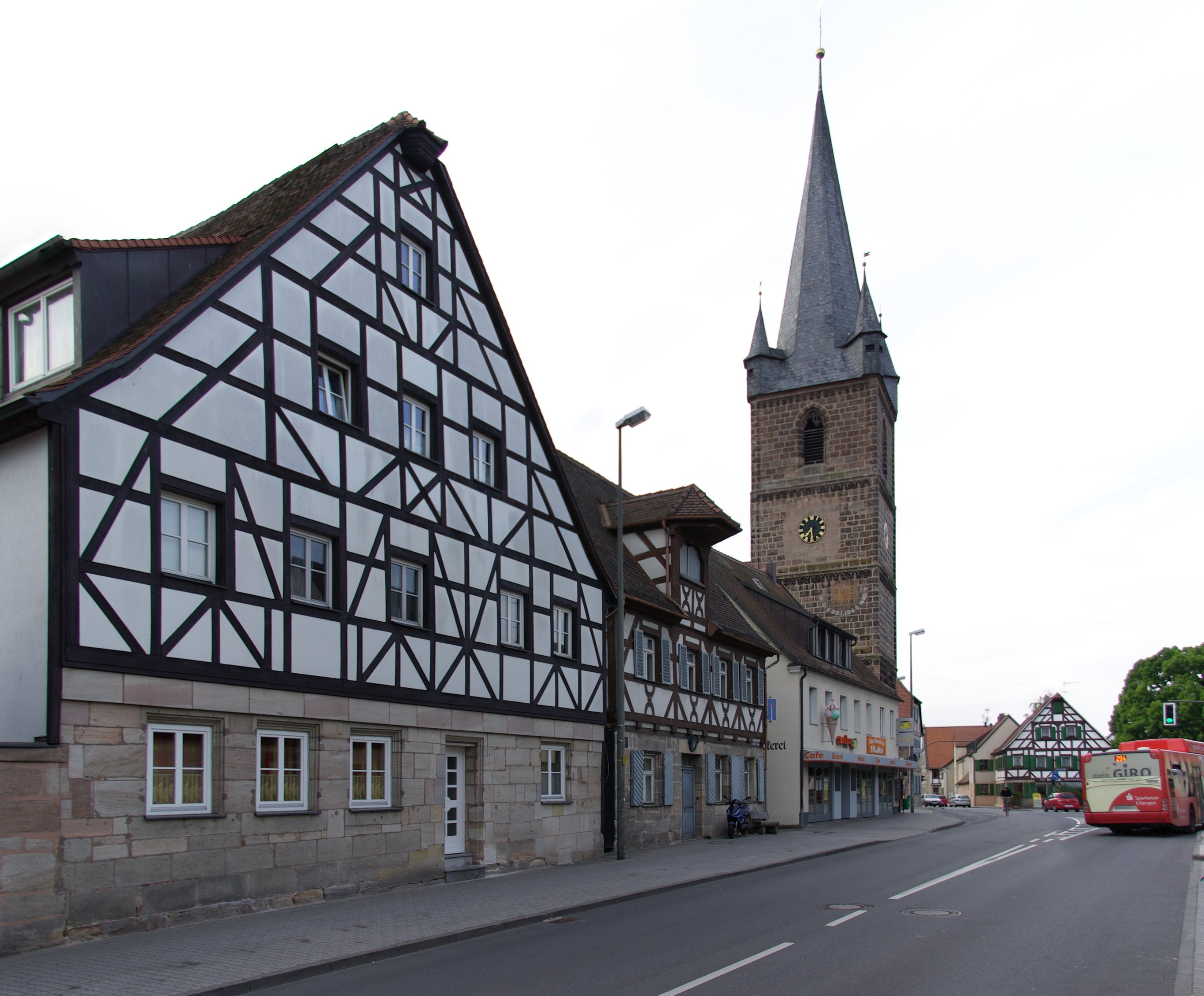 Fachwerkhäuser Fürther Straße 54 und 52 (früher Haus Nr. 19a und 18a) und Evangelische Kirche St. Peter und Paul im Erlanger Stadtteil Bruck